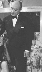 Antonio Provitilo-actor